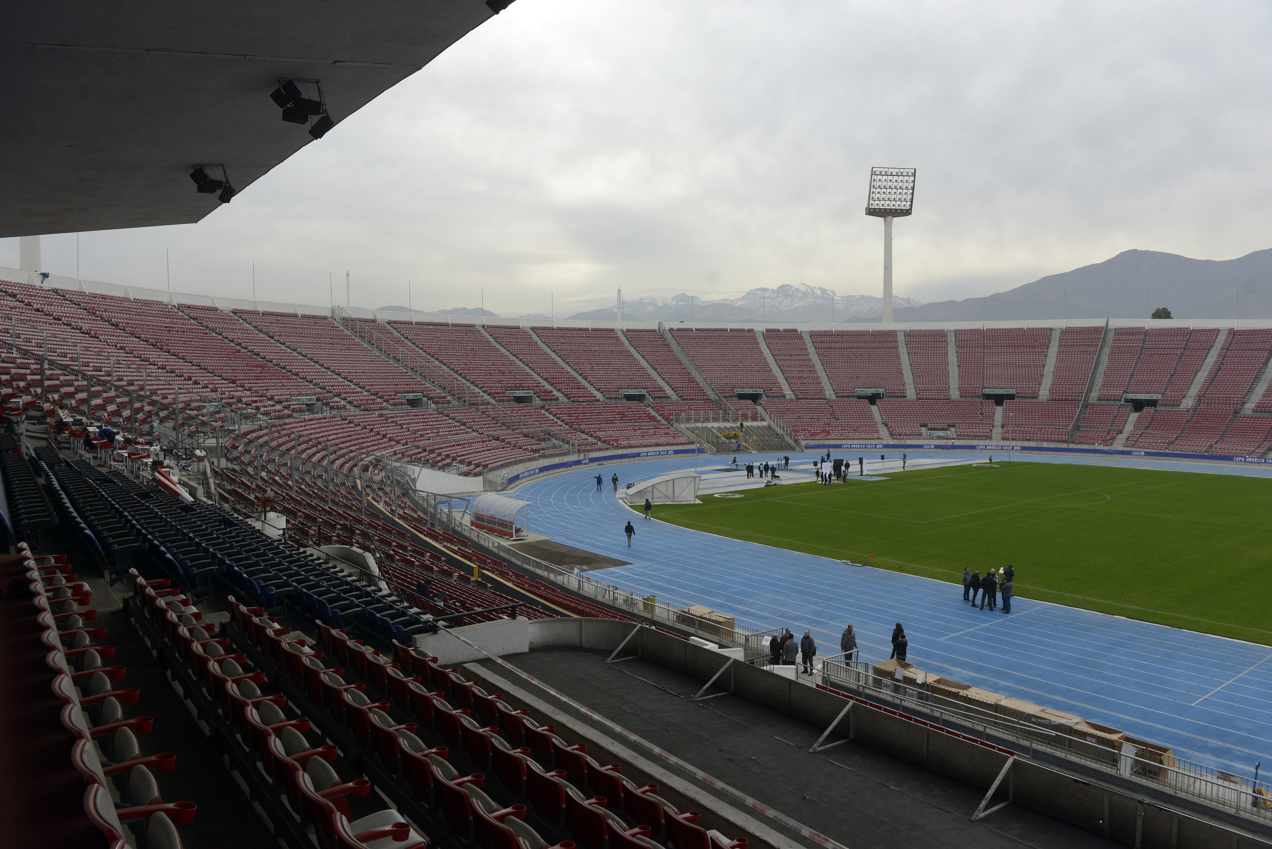 04 Junio 2015, Ministro Marcelo Díaz junto a la Ministra Riffo lanzan página web con información de la Copa America 2015.